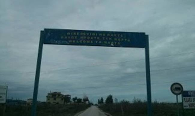 Πινακίδα 'Καλώς ήρθατε στη Νάρτα' στα αλβανικά, στα ελληνικά και στα αγγλικά